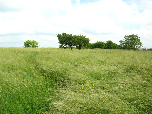 Кайзервальд (парк "Знесенье"), Львов, гора Род (Баба)